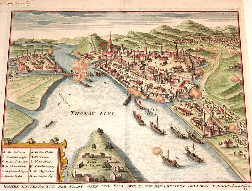 Pest várának ostroma, 1602